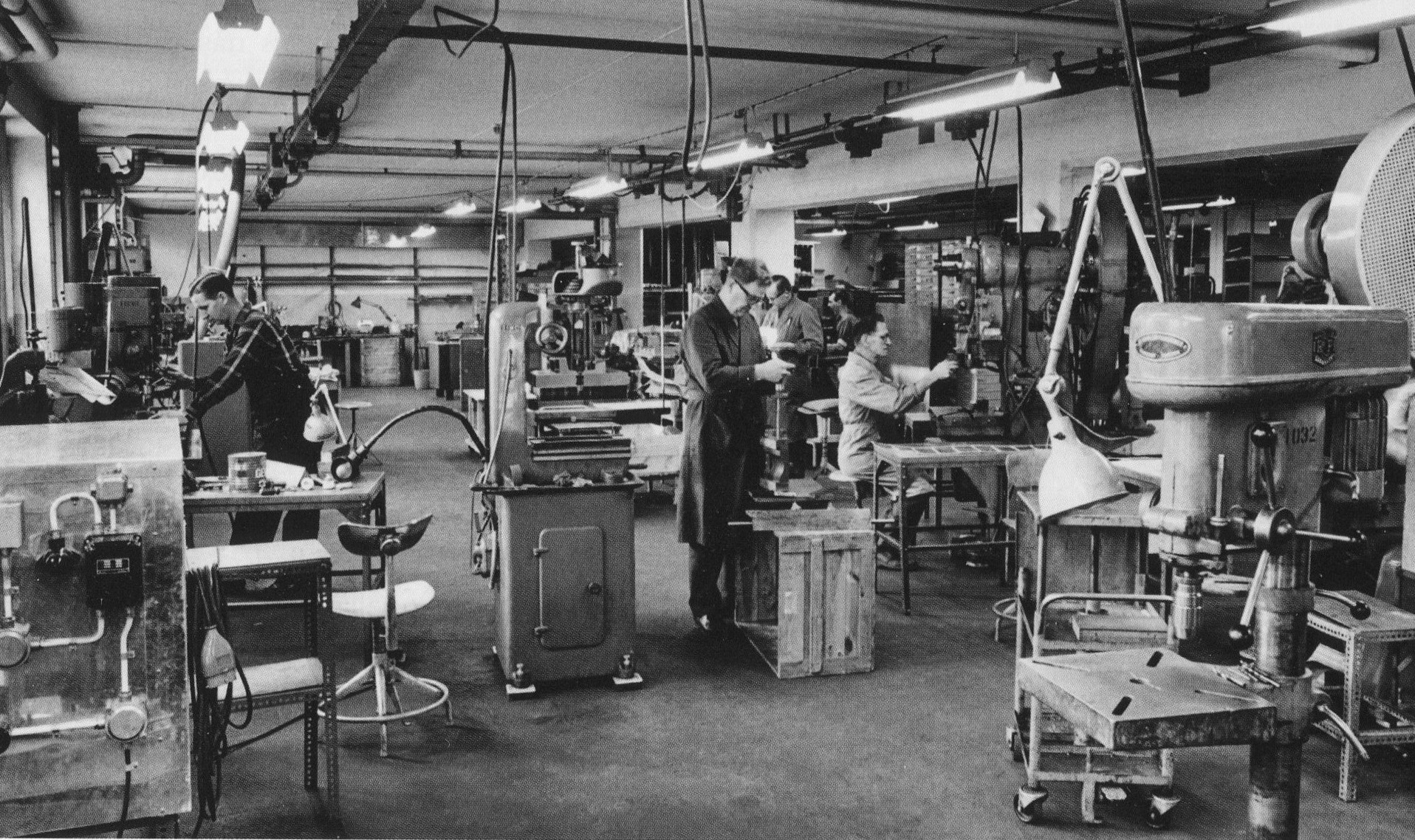 Gyllings Centrum-fabrik i Gröndal